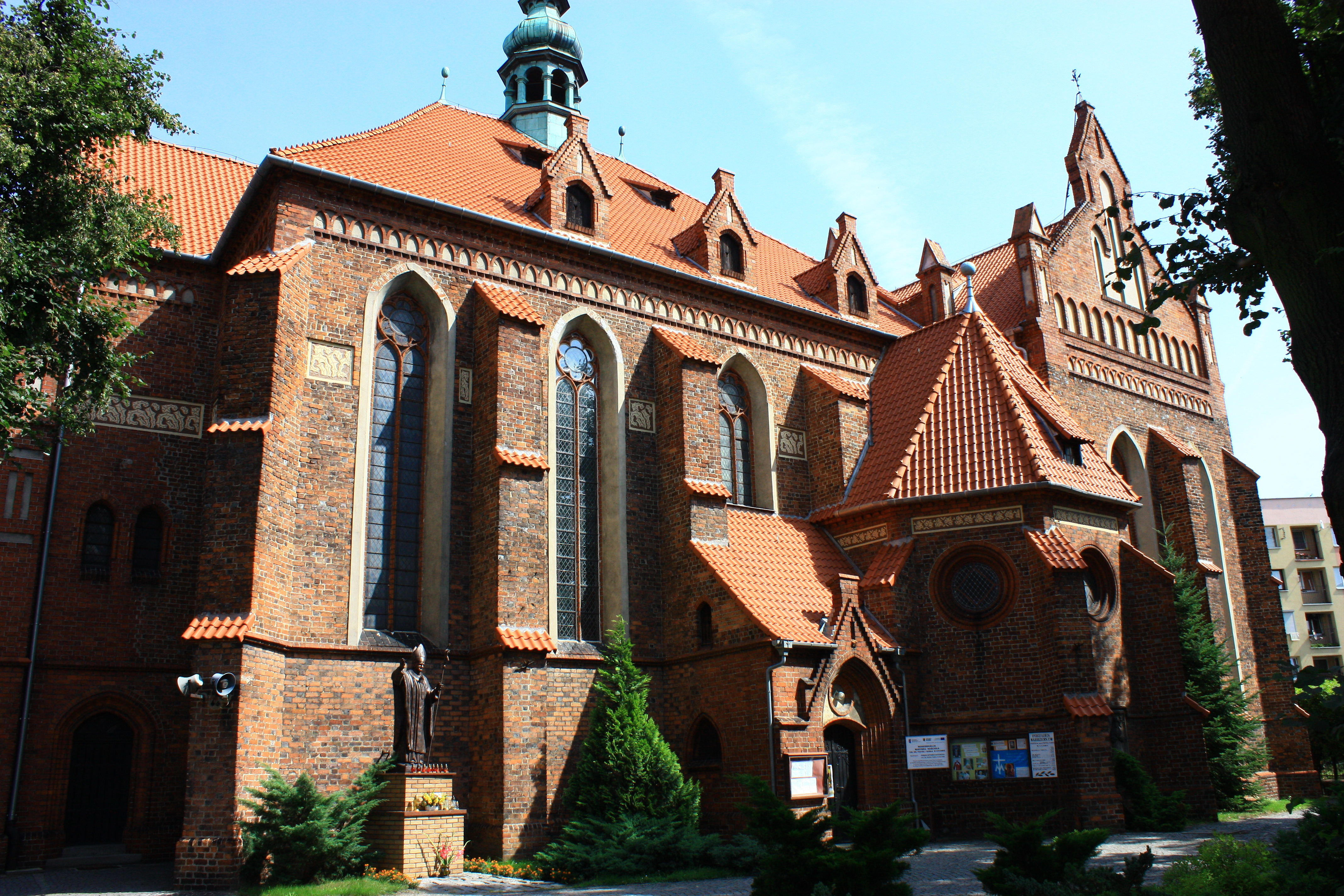 Syców, kościół par. p.w. śś. Piotra i Pawła, XV, 1815, 1908